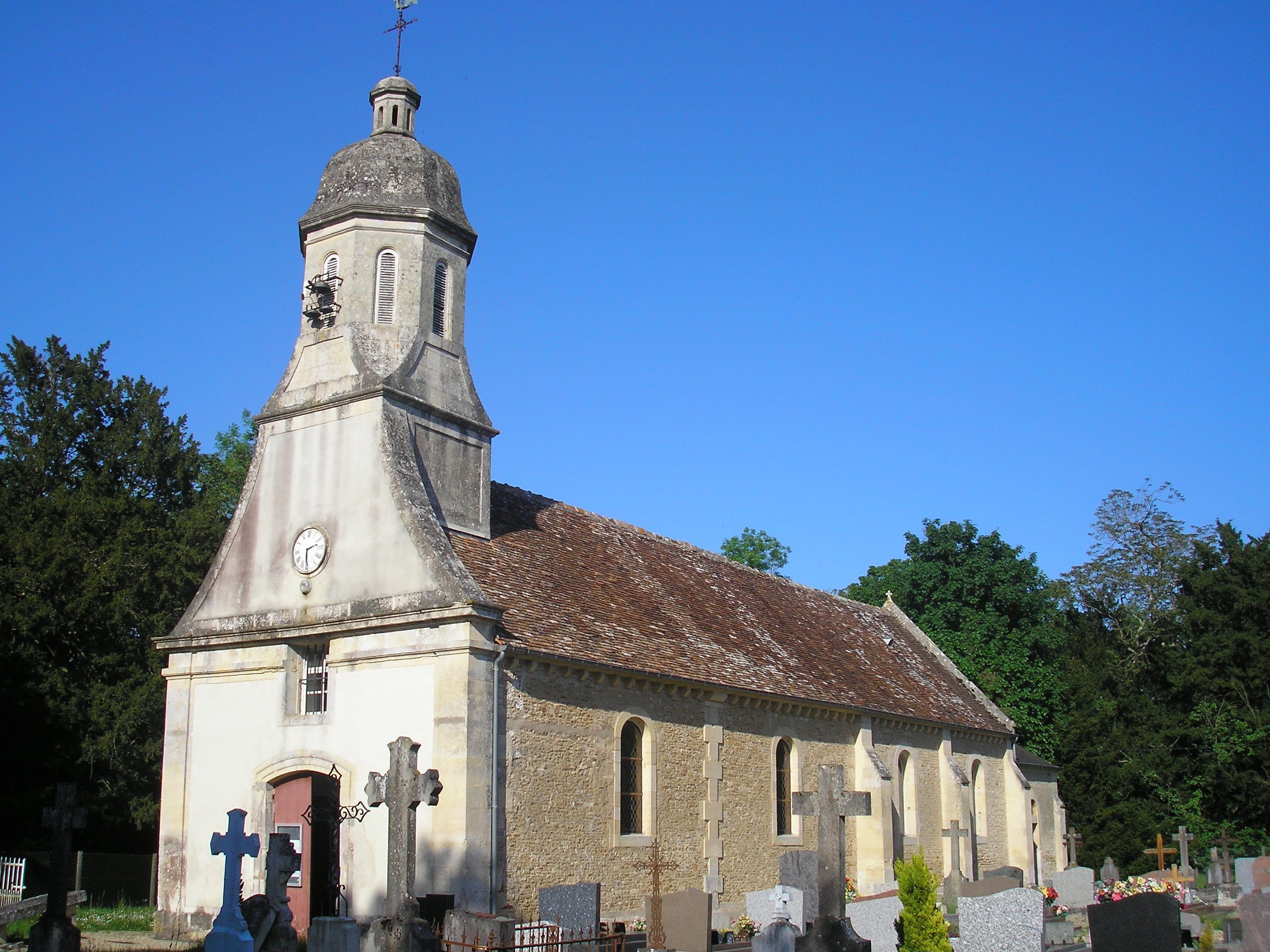 Canteloup (Calvados, Normandie, France). L'église Saint-Jean-Baptiste.